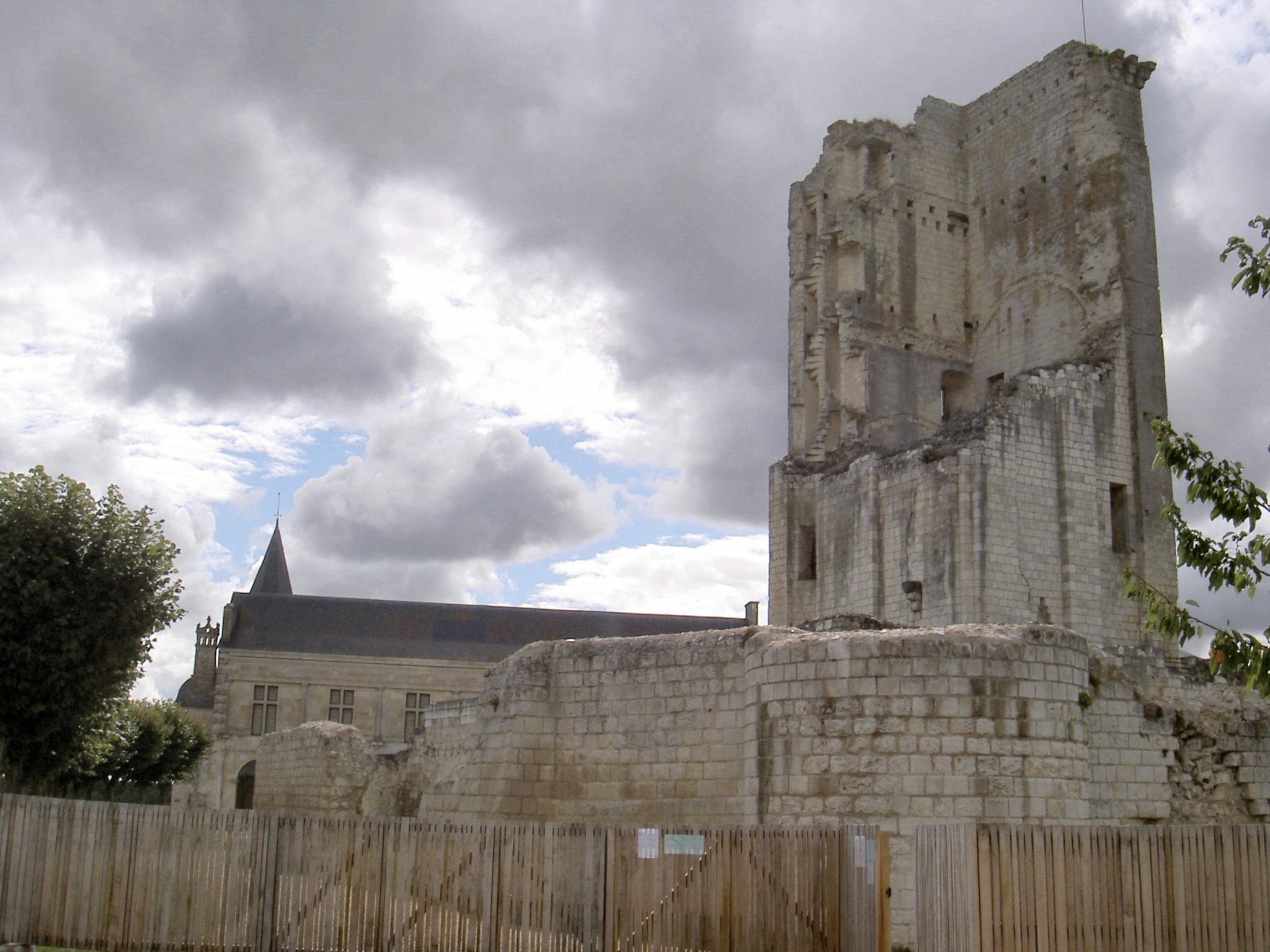 PA00097768